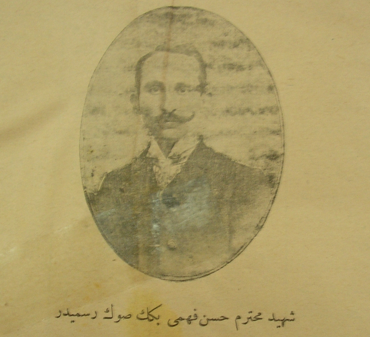 Hasan Fehmi Bey, Türk basın tarihinde öldürülen ilk gazeteci. Osmanlıca yazı: "Şehid muhterem Hasan Fehmi beyin son resmidir"